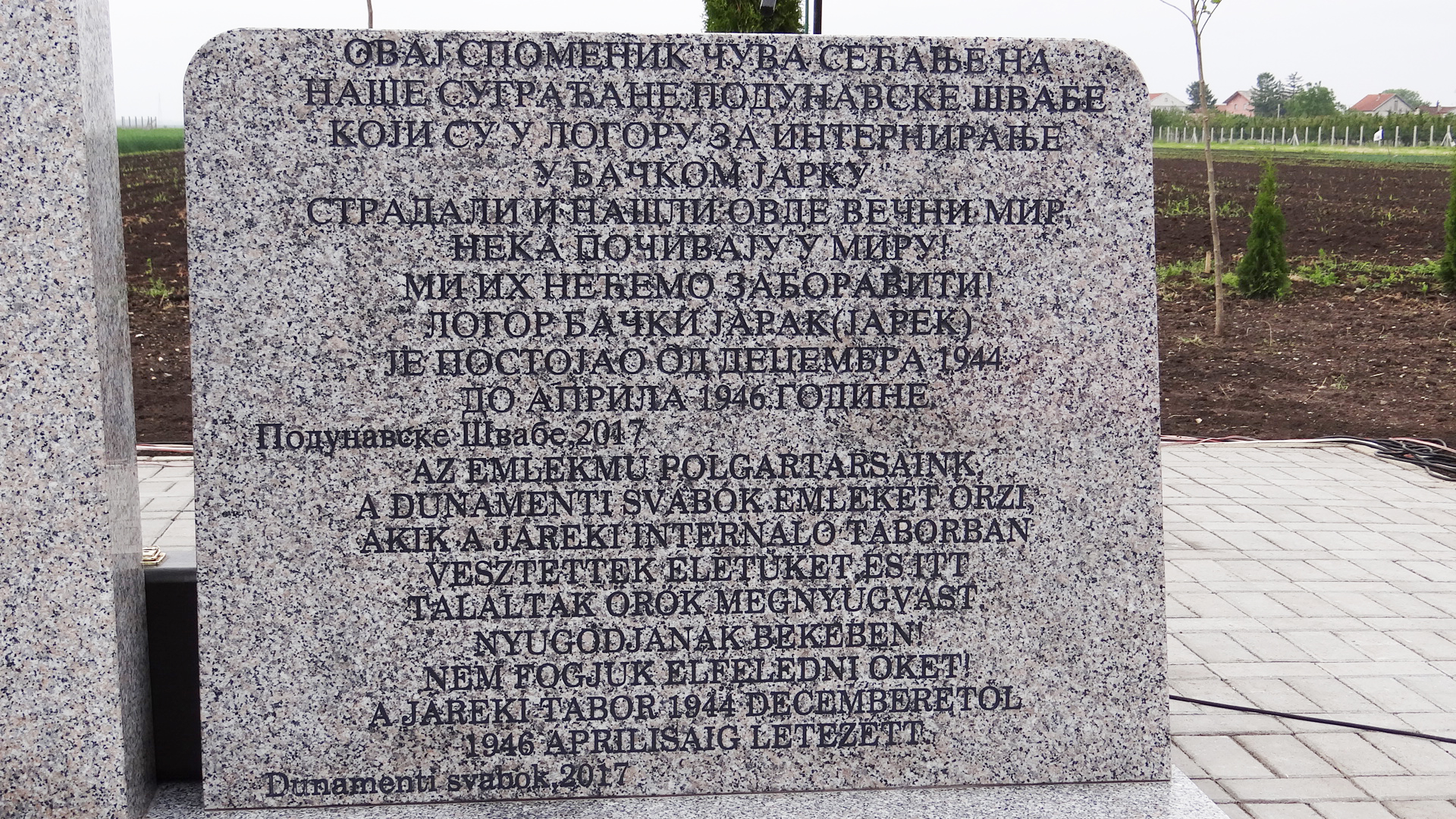 Sebischer Text an der Gedenkstätte für die Toten des Internierungslagers Jarek